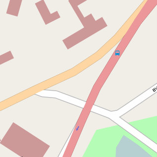 Голосіївська площа в Києві